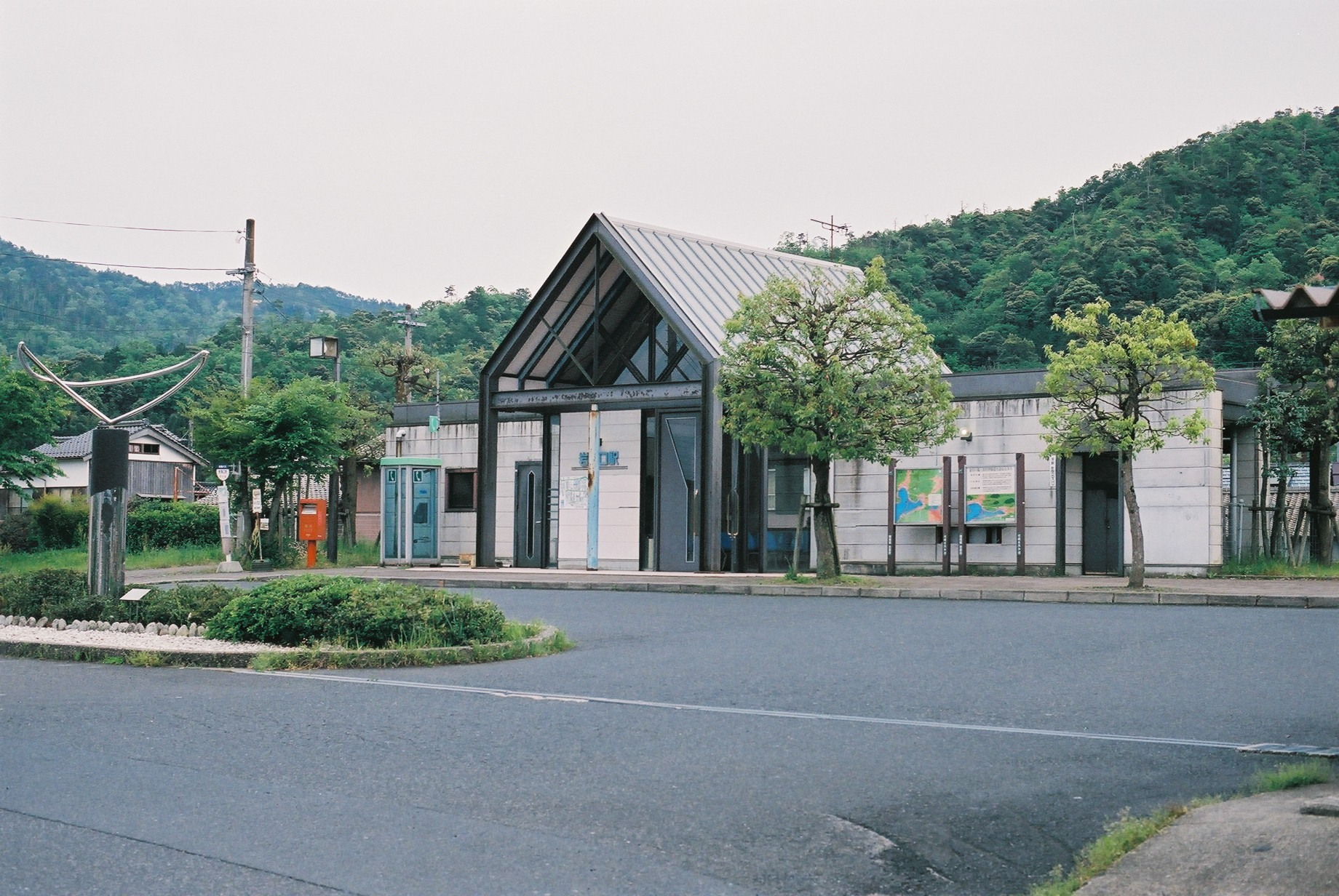 北近畿タンゴ鉄道宮津線岩滝口駅 京都府宮津市字須津